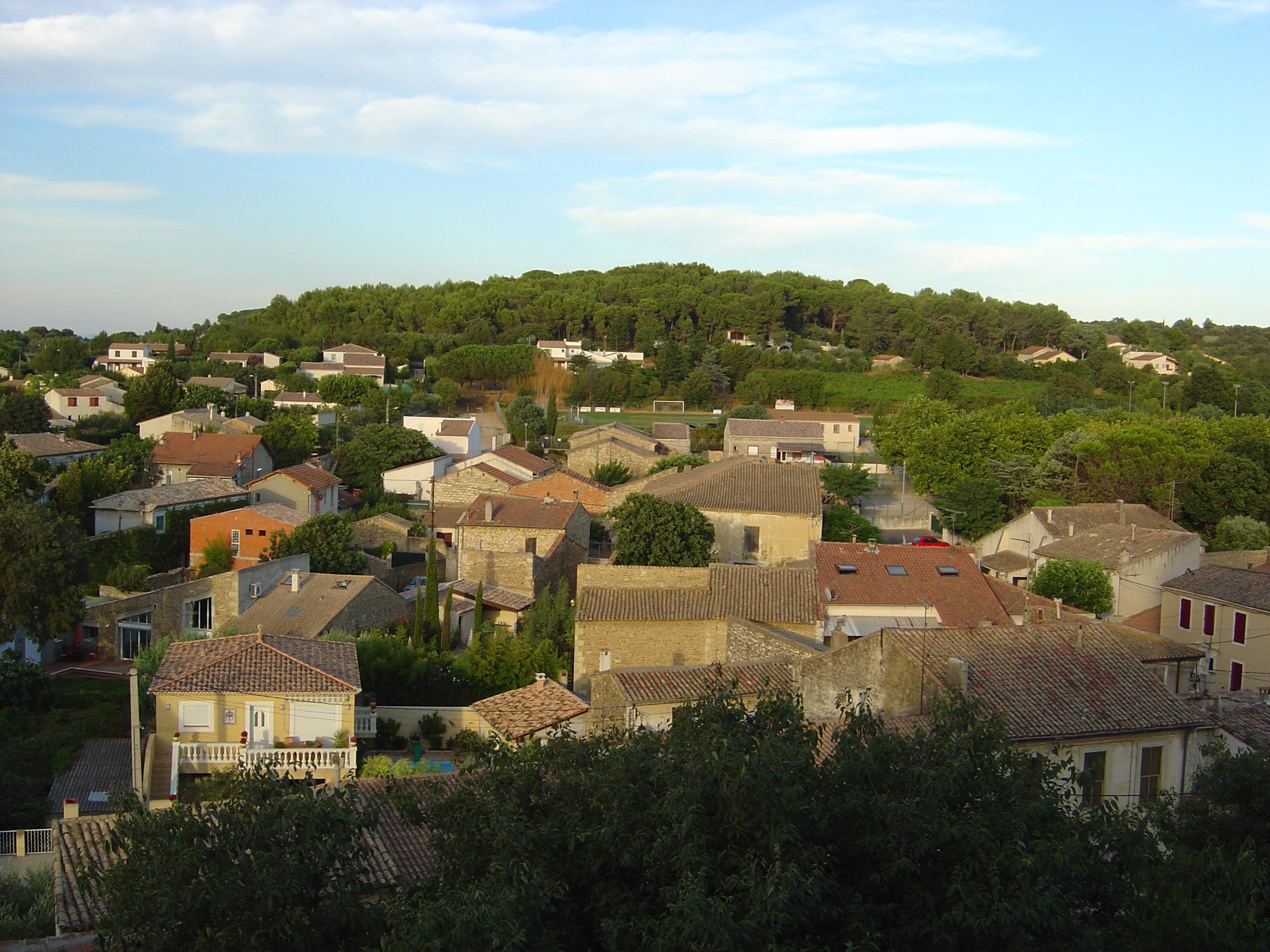 Beauvoisin - vue depuis le belvédère du Château